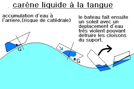 présentation en image d'une carène liquide à la tangue